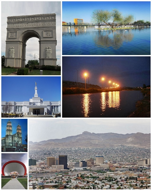 Montaje de imágenes de Juarez. De arriba a abajo de izquierda a derecha: Réplica del arco del triunfo Parque Central Poniente. Templo de Ciudad Juárez Rio Bravo Catedral de Ciudad Juárez Concha acústica en la Plaza de la Mexicanidad. Panorámica de la ciudad